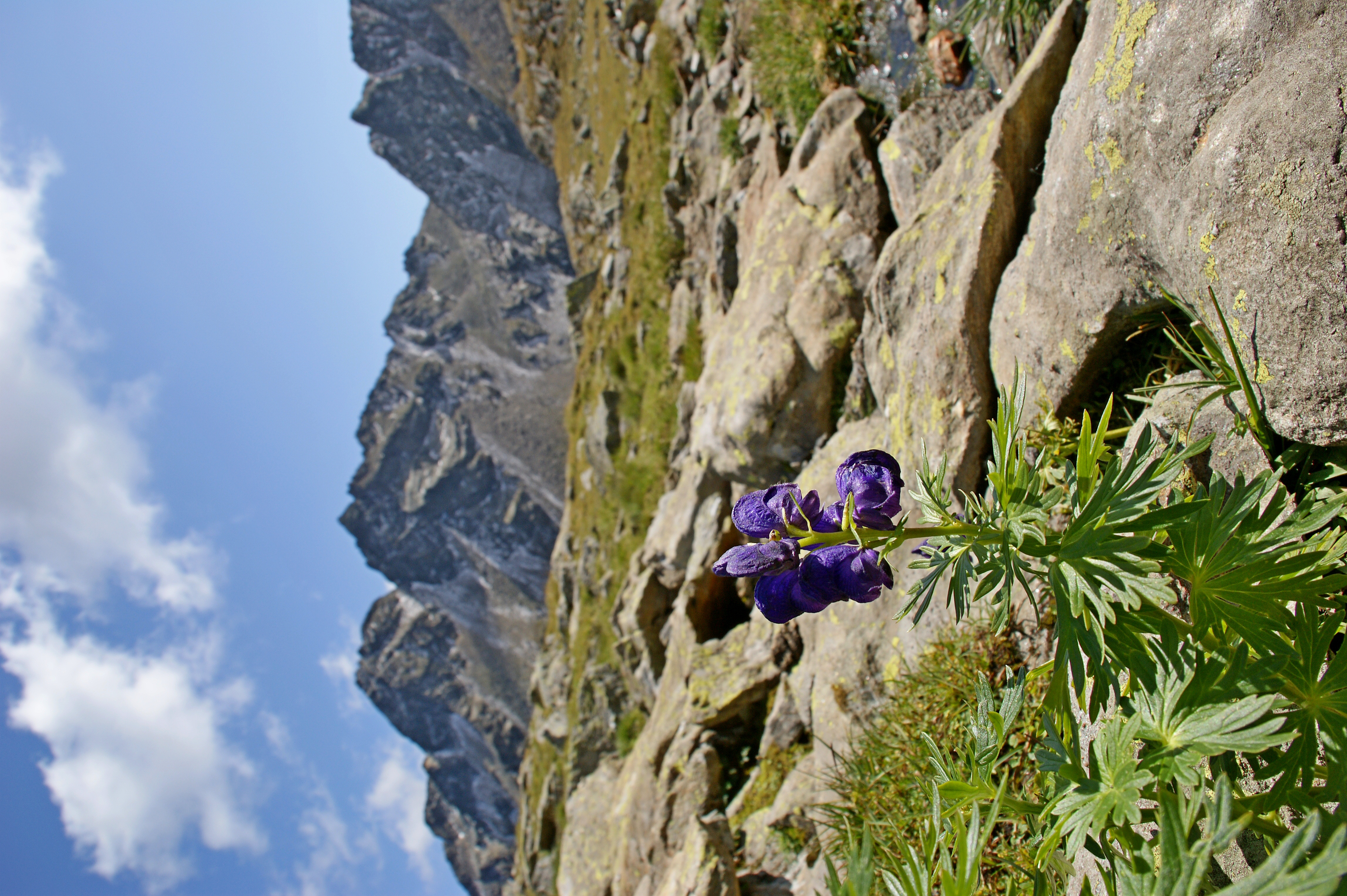 Am Wangenitzsee in der Schobergruppe, Kärnten, Österreich. Blauer Eisenhut (Aconitum napellus). Im Hintergund Geißkofel und Himmelwand This file shows the National Park Hohe Tauern in Austria.